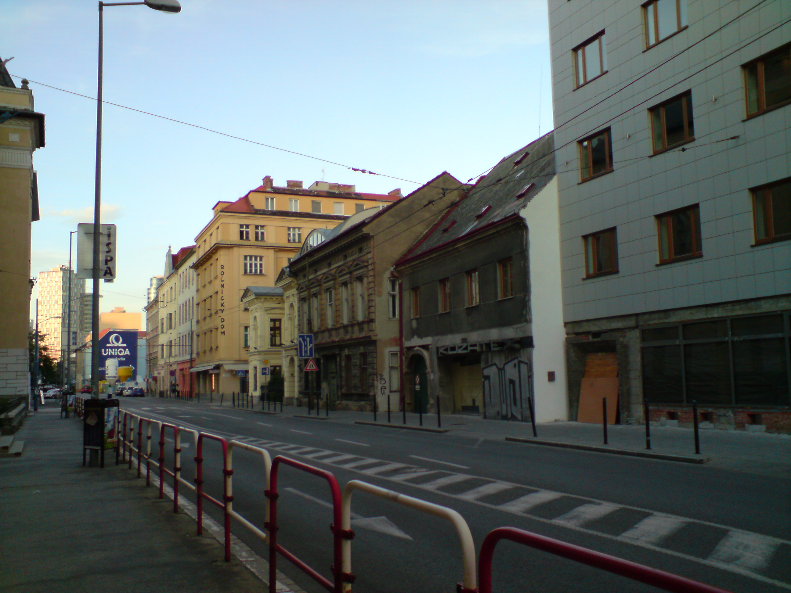 Dunajská ulica v Bratislave